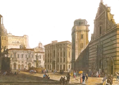 La piazza del Duomo di Messina a inizio XIX secolo, ricostruita dopo il terremoto del 1783, in un'incisione acquarellata.